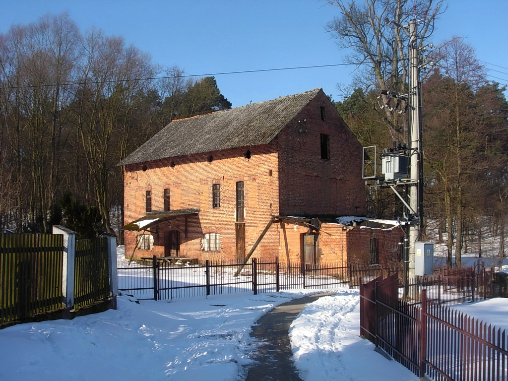 Dawny młyn wodny na Strudze Młyńskiej – dopływie Kanału Bydgoskiego na granicy osiedli Miedzyń i Prądy w Bydgoszczy